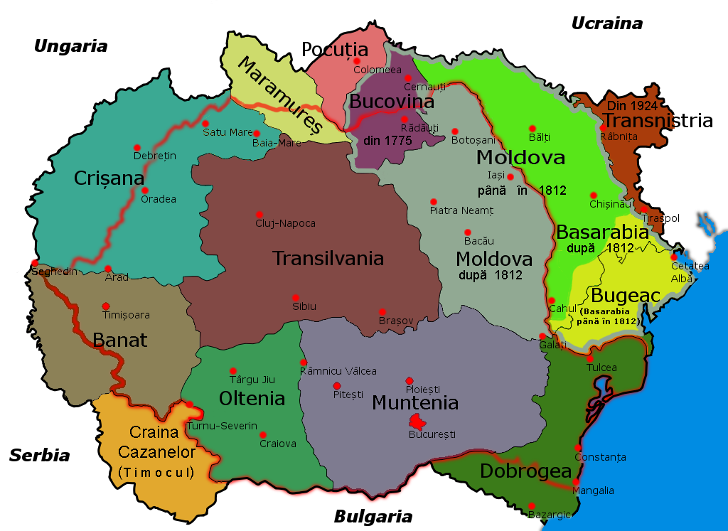 Regiuni istorice romanesti